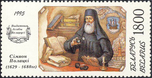 Беларуская (тарашкевіца): Сімяон Полацкі. Белпошта.